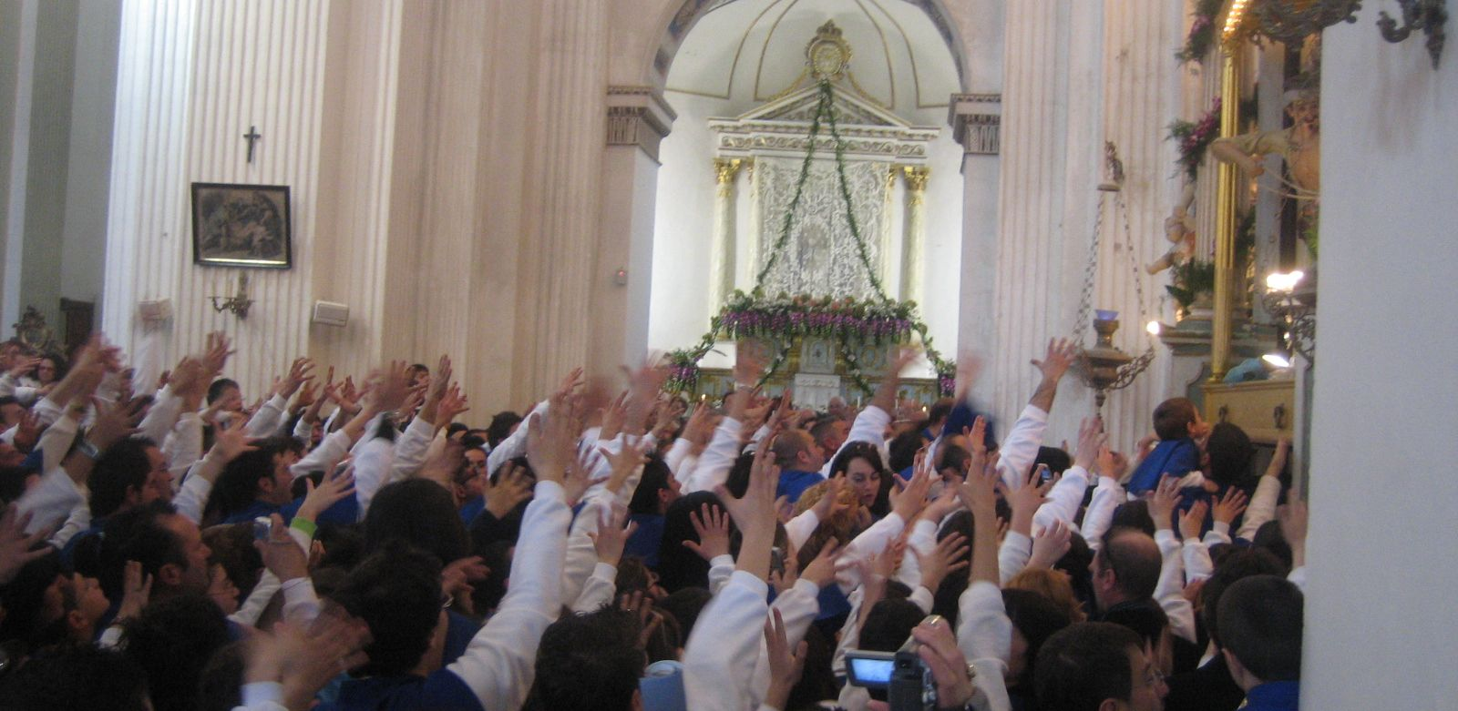 Foto liberamente concessa da G.Caschetto e non protetta da copyright